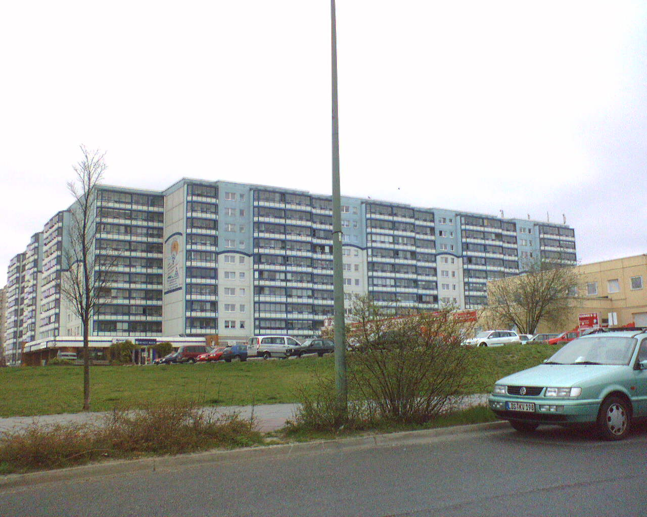 Block im Altglienicker Neubaugebiet